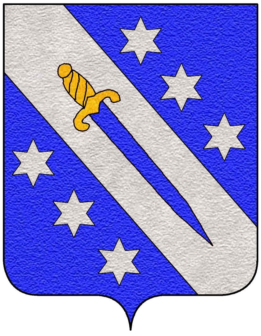 Stemma della famiglia Cerva (Crijević)